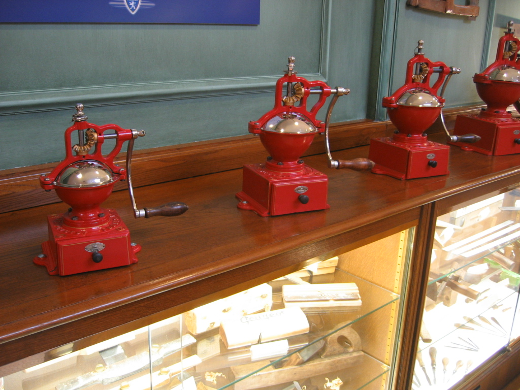 Moulin à Café Peugeot - Musée Peugeot Sochaux